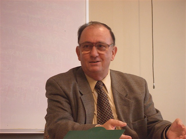 Professor Michael Stone